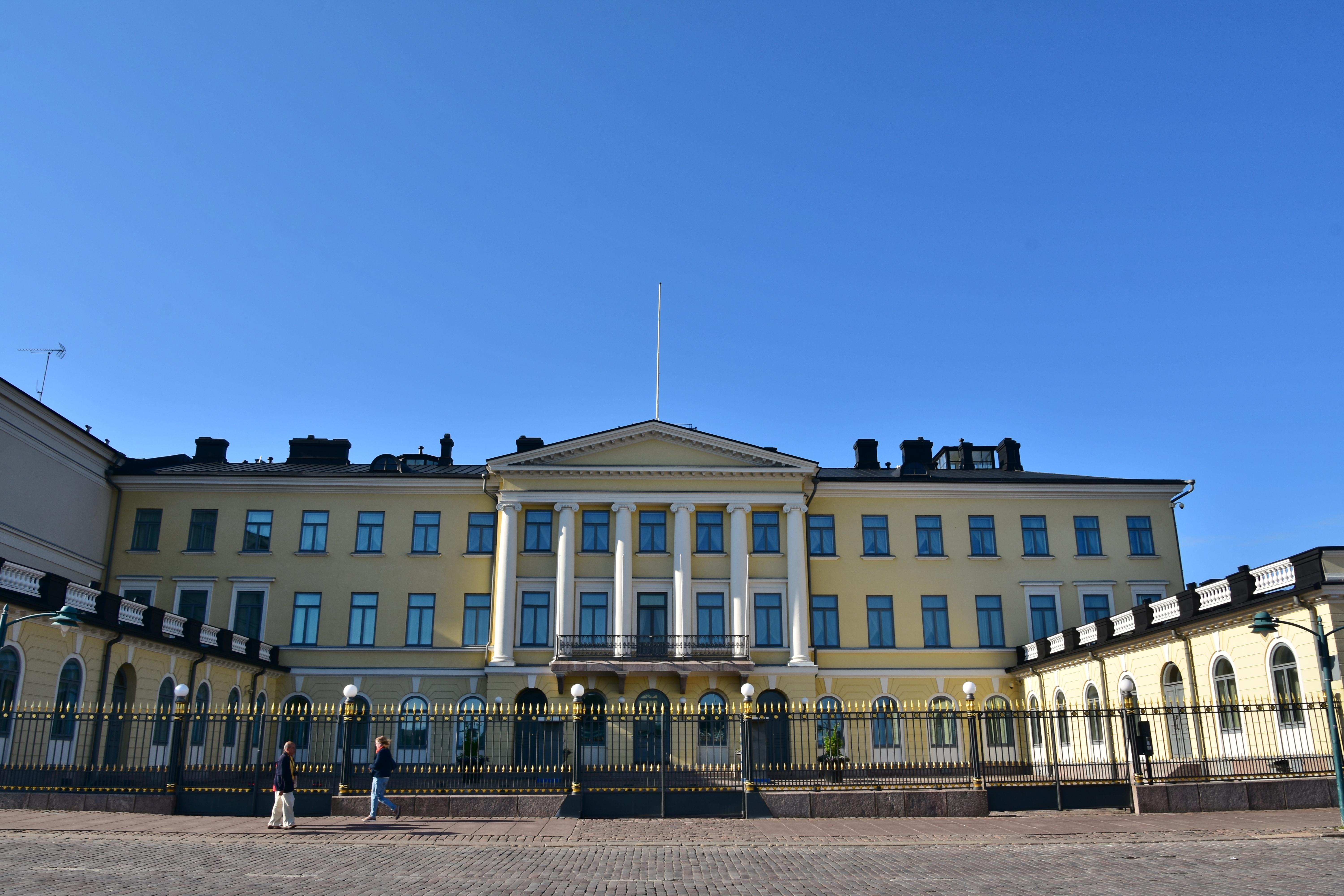 Presidential Palace, Helsinki, 1820 (2)